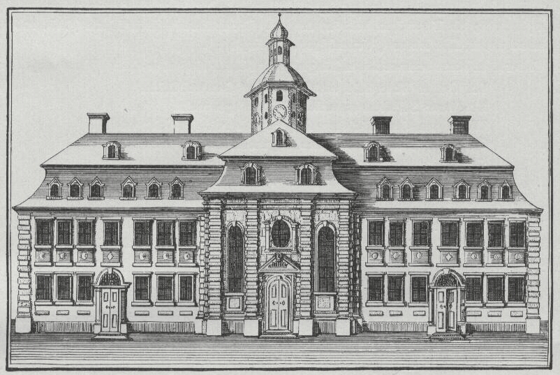 Seite 91, Abb. 106, Untertitel: Gravenreuther Stift in St. Georgen. Nach einer gleichzeitigen Kupferplatte. Sammlungen des historischen Vereins von Oberfranken.